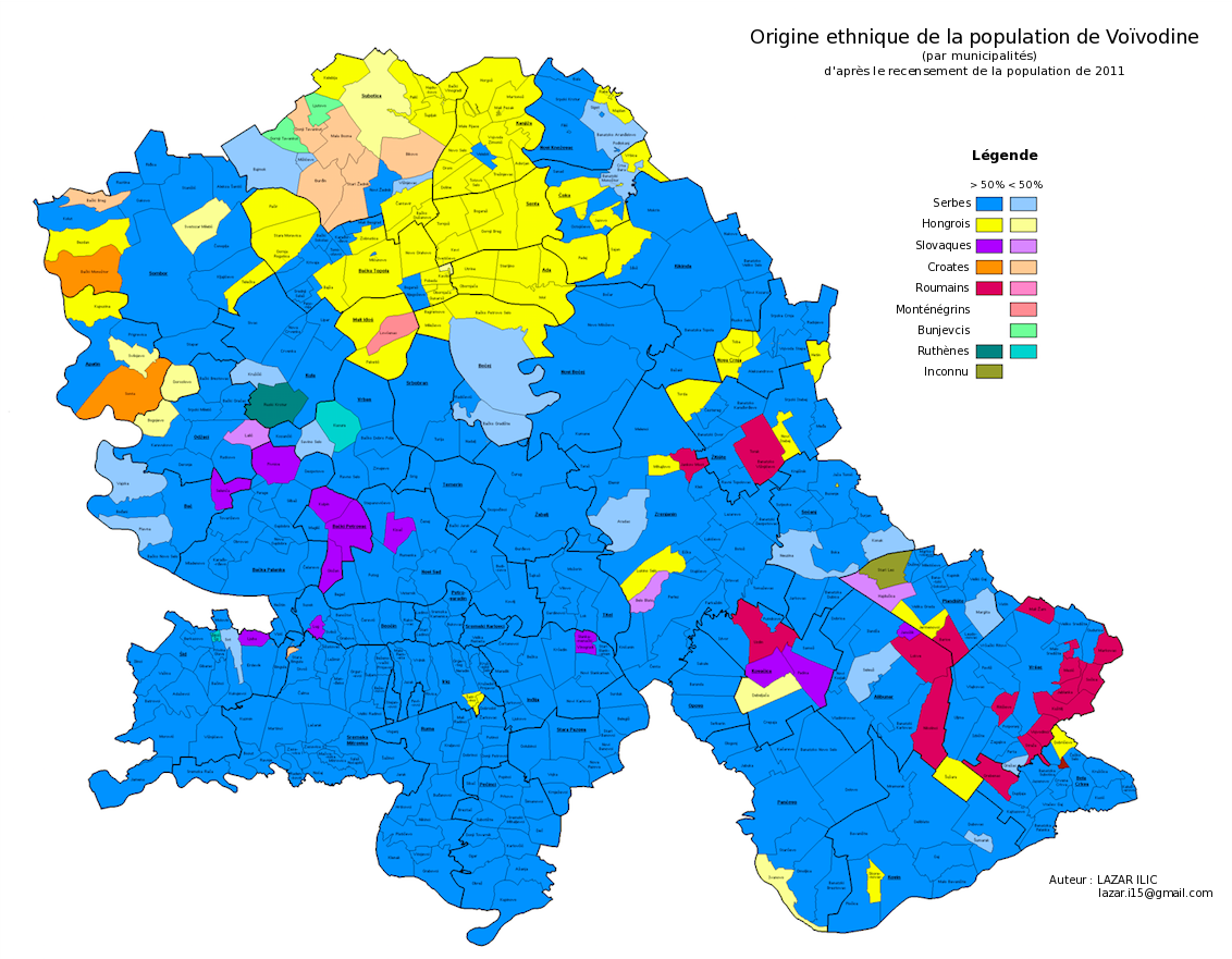 Origine ethnique de la population de Voïvodine (recensement de 2011).